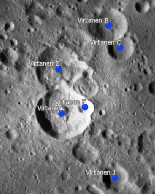 Cráter lunar Virtanen. Cráteres satélite. (Imagen LRO)